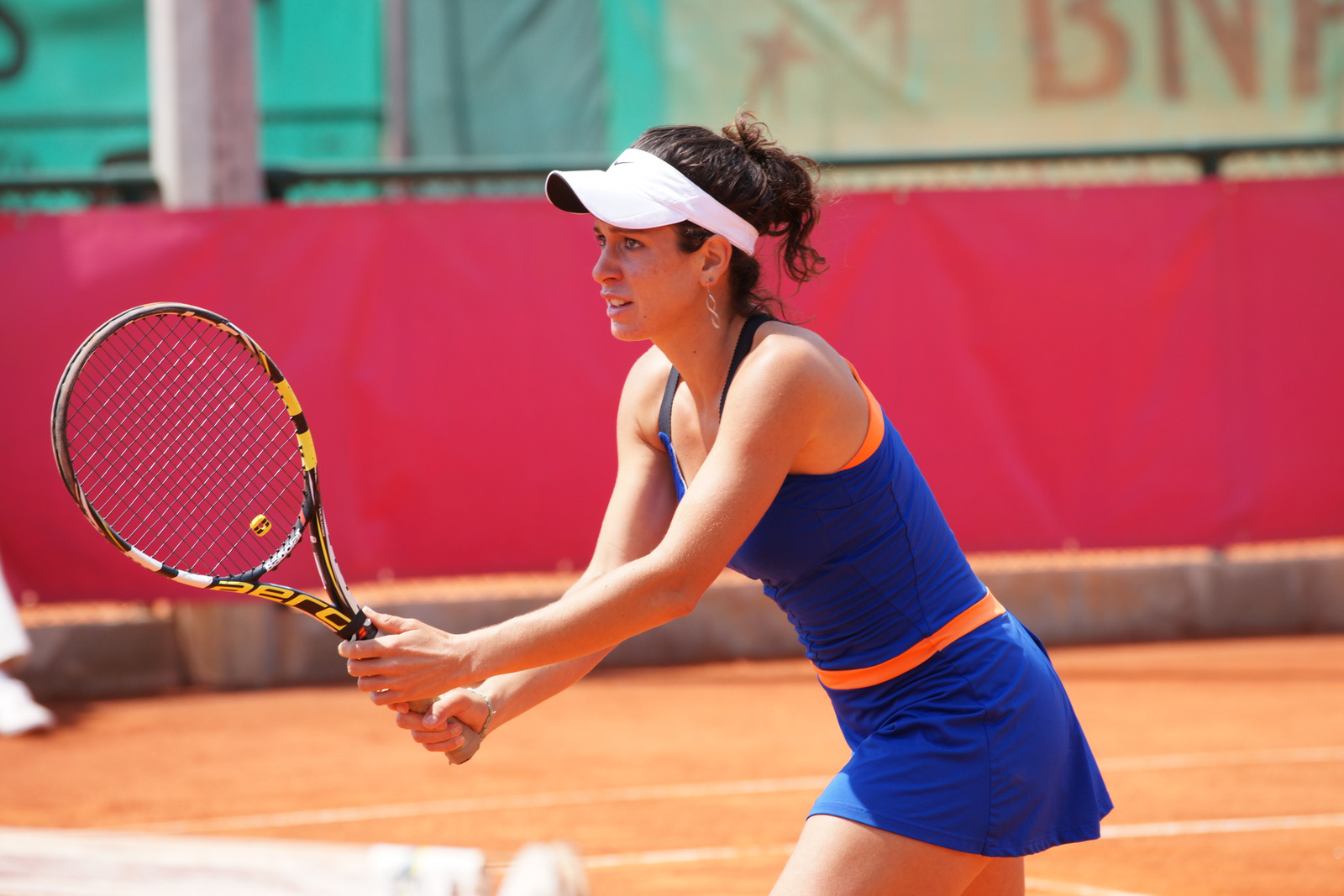 Julia Cohen, Cagnes-sur-Mer 2013